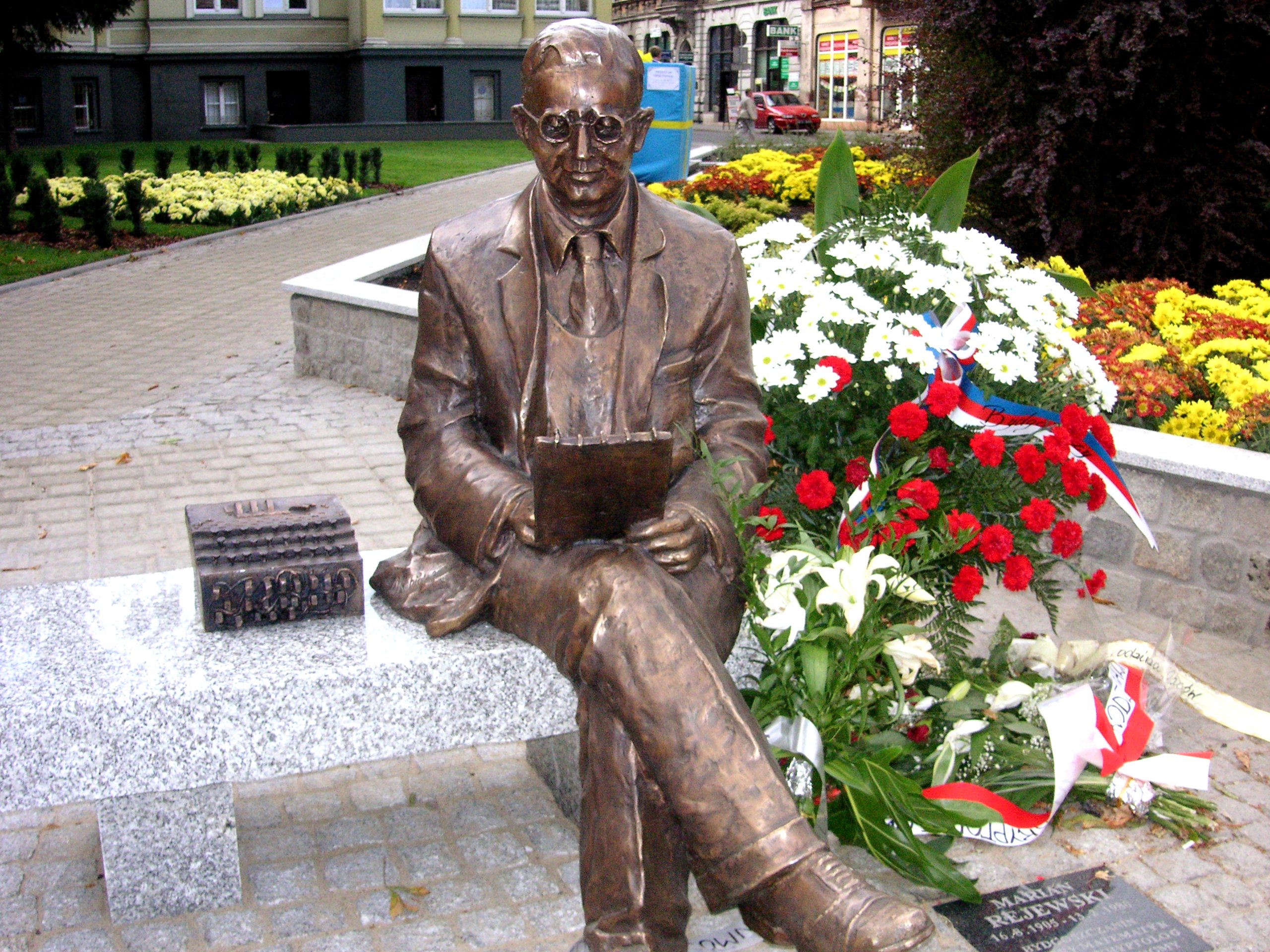 Marian Rejewski Monument in Bydgoszcz, Poland, 2005